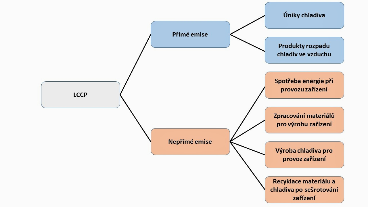 Struktura indexu LCCP, kterým se charakterizuje, jaký dopad na globální klima může mít určitý chladicí systém během své životnosti.